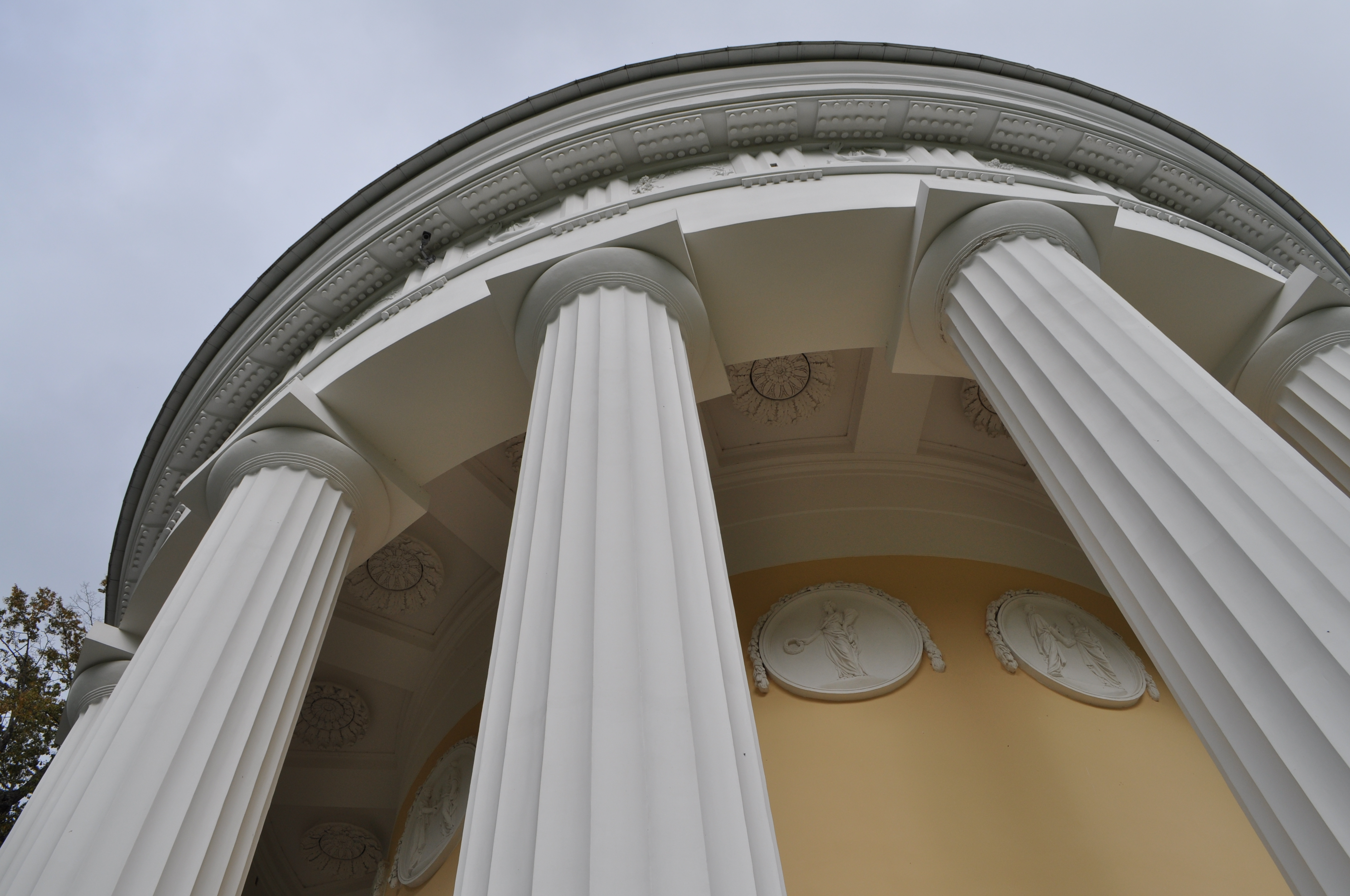 Храм Дружбы(Павловск)